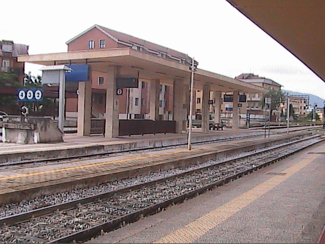 Il fascio di binari della stazione ferroviaria di Isernia, fotografata nel settembre 2009.